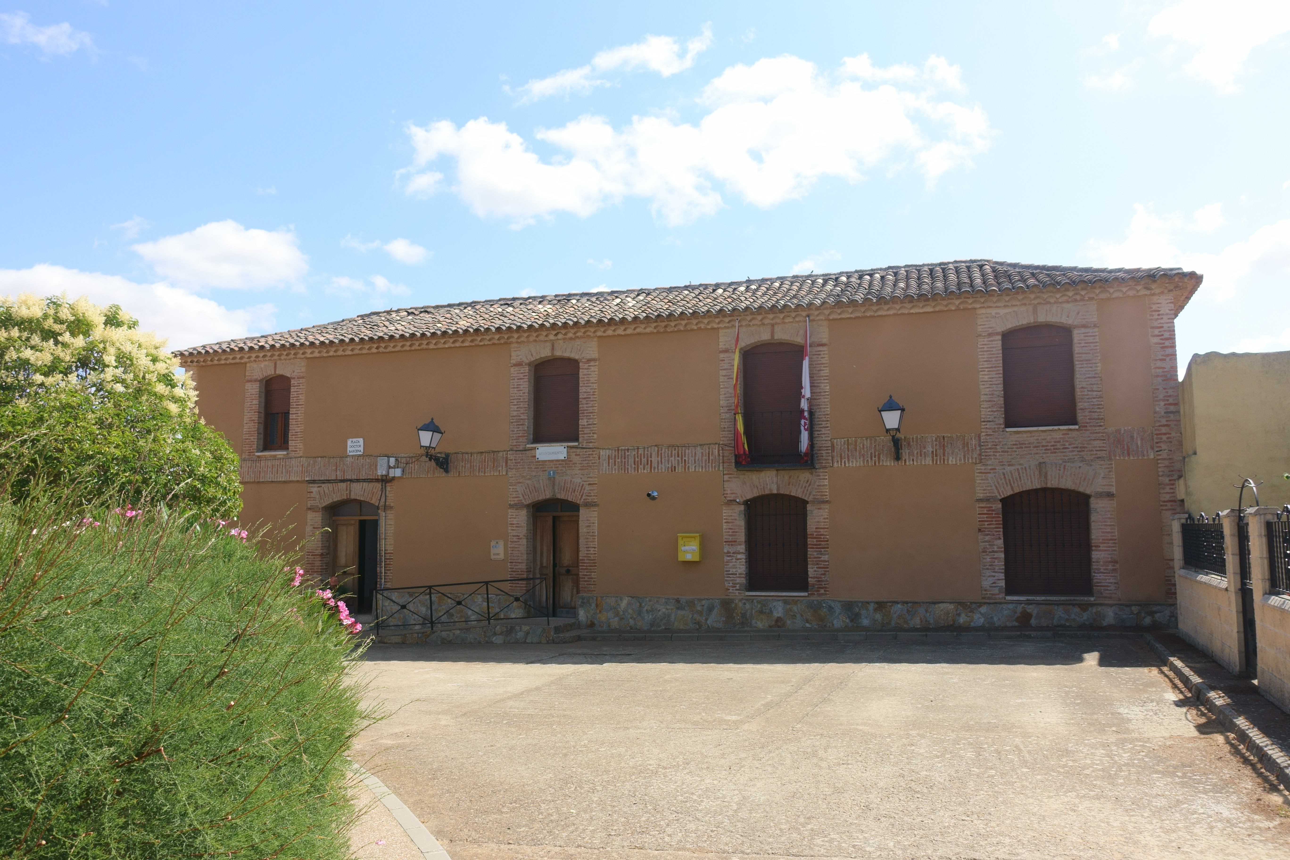 Casa consistorial de Valdunquillo (Valladolid, España).